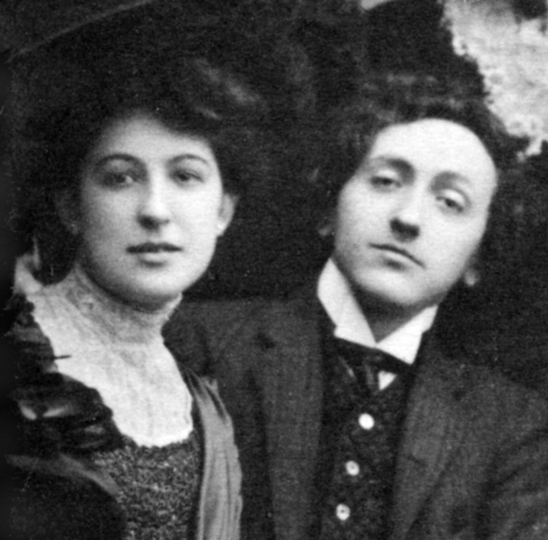 фрагмент фотографии участников Старинного театра: Н. И. Бутковская и Н. Н. Евреинов. 1907